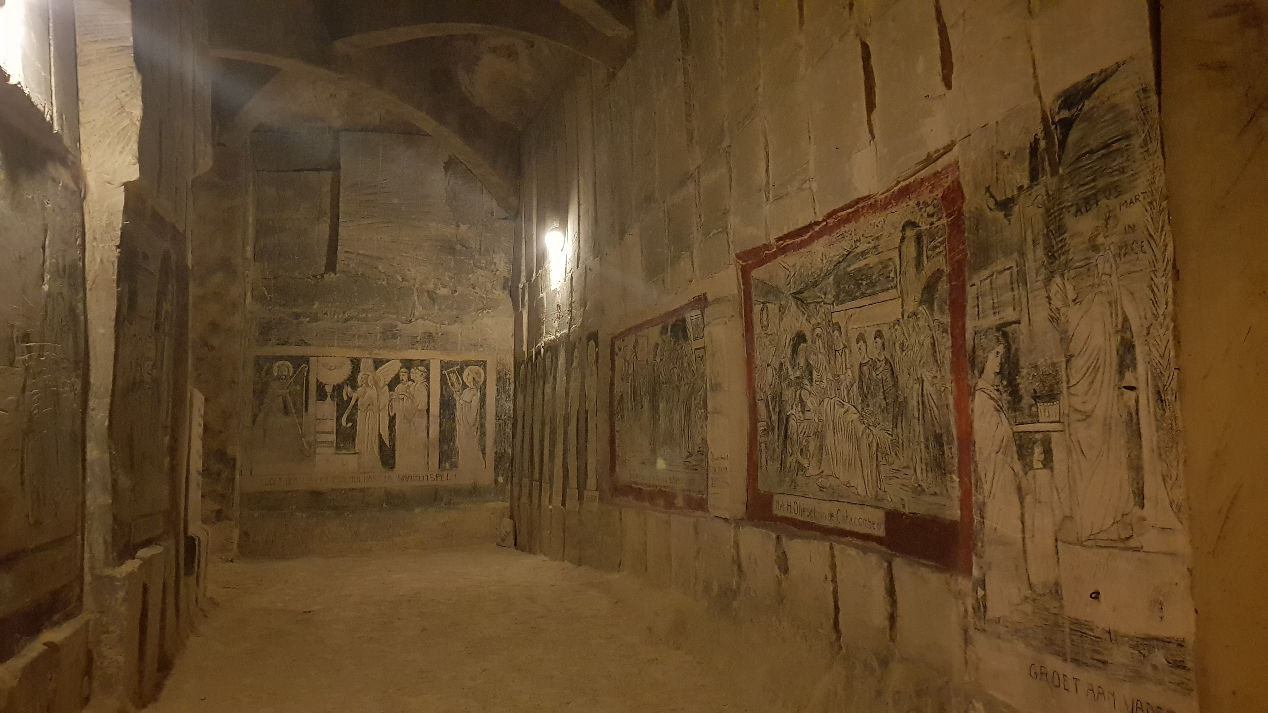 Groeve de Schark, Maastricht, Nederland